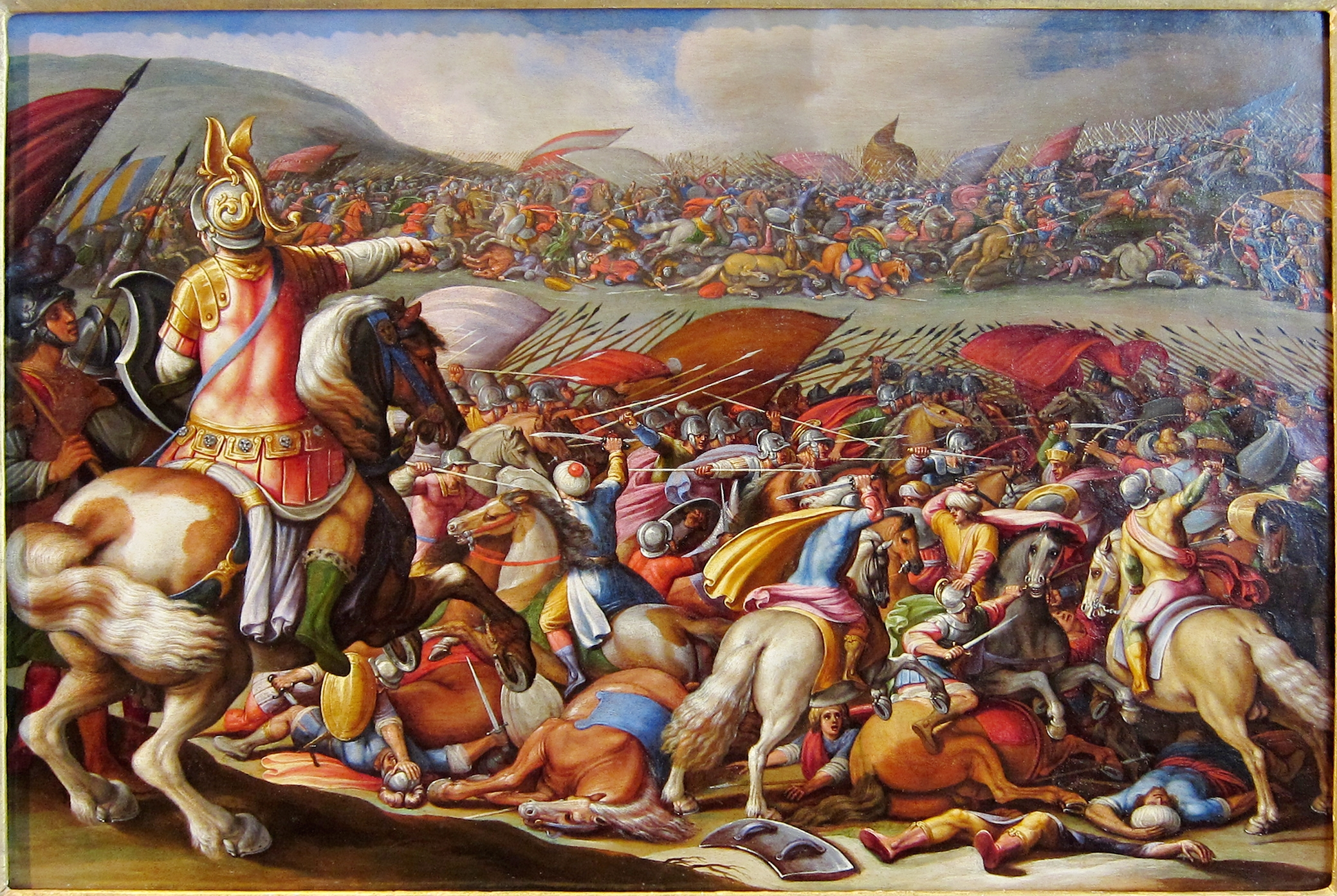 Scène de bataille.title QS:P1476,fr:"Scène de bataille." label QS:Lfr,"Scène de bataille."